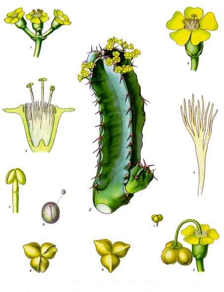 Euphorbium. A Ast mit Blüthe, nat. Grösse; 1 3köpfiger Blüthenstand, vergrössert; 2 Cyathium, desgl.; 3 männliches Cyathium im Längsschnitt, desgl.; 4 männliche Blüthe, desgl.; 5 Deckblatt- oder Spreuschuppe, desgl.; 6 ein fruchttragendes Cyathium, desgl.; 7 Fruchtkapsel, nat. Grösse; 8 Fruchtkapsel von oben, vergrössert; 9 dieselbe im Aufspringen, desgl.; 10 Same von der Bauchseite.